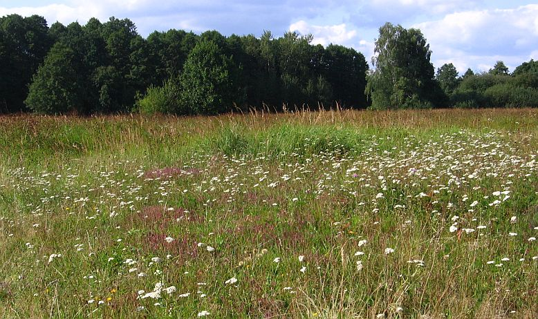 Łąki Krwiściągowe w Dąbrowie Górniczej